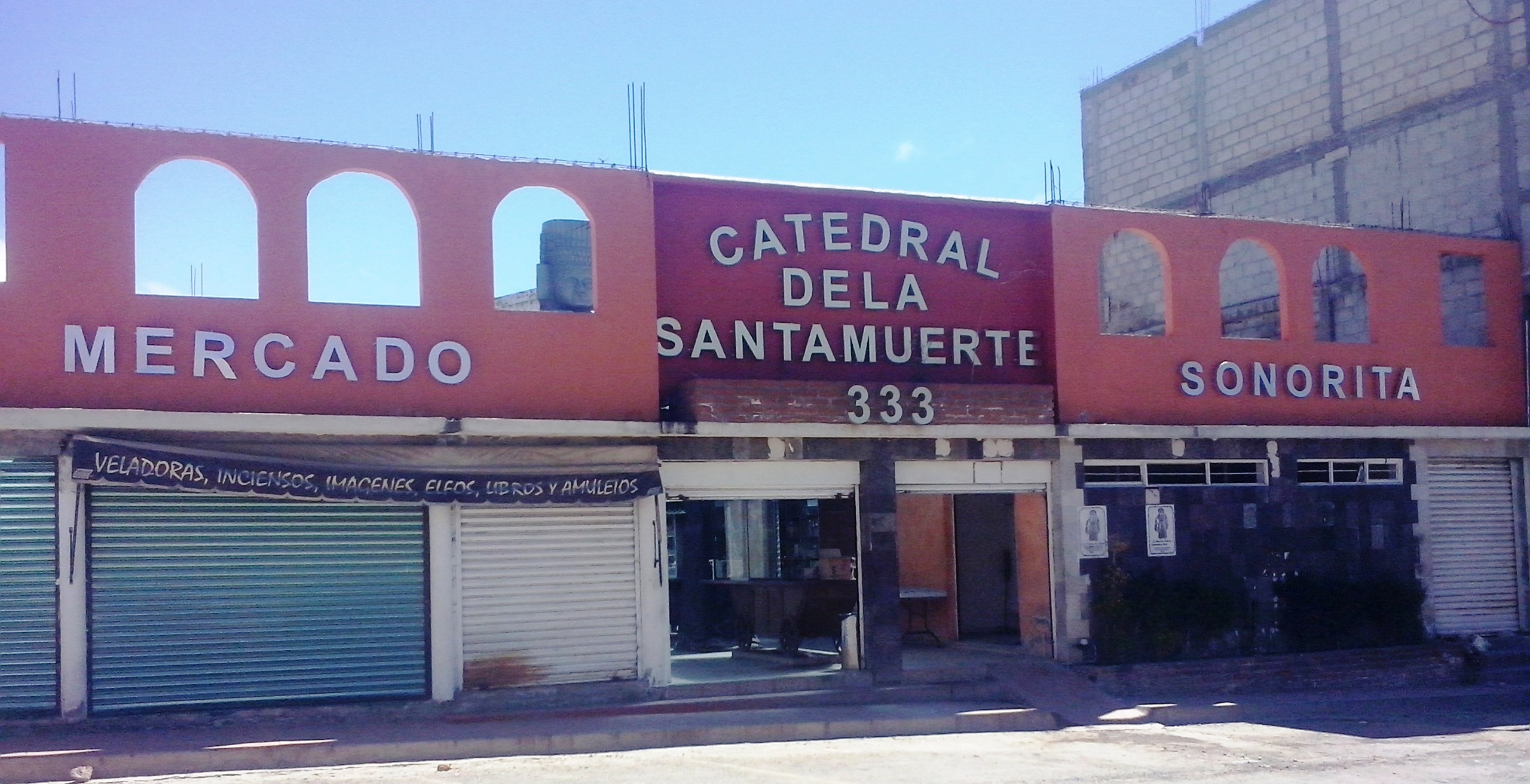 Mercado Sonorita (Catedral de la Santa Muerte) en Pachuca, México.